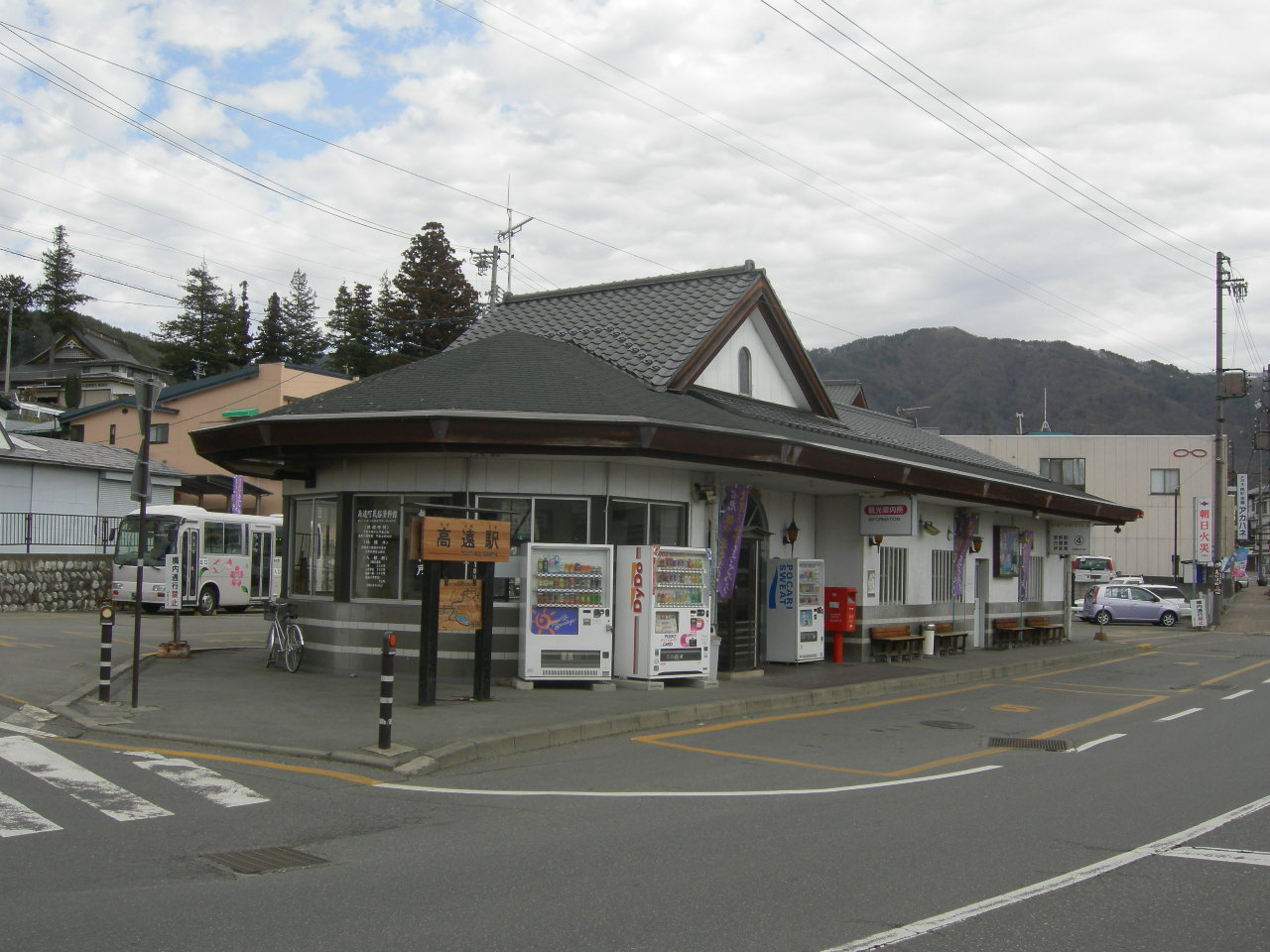 JRバス関東高遠駅（JR bus kanto,Takato station）